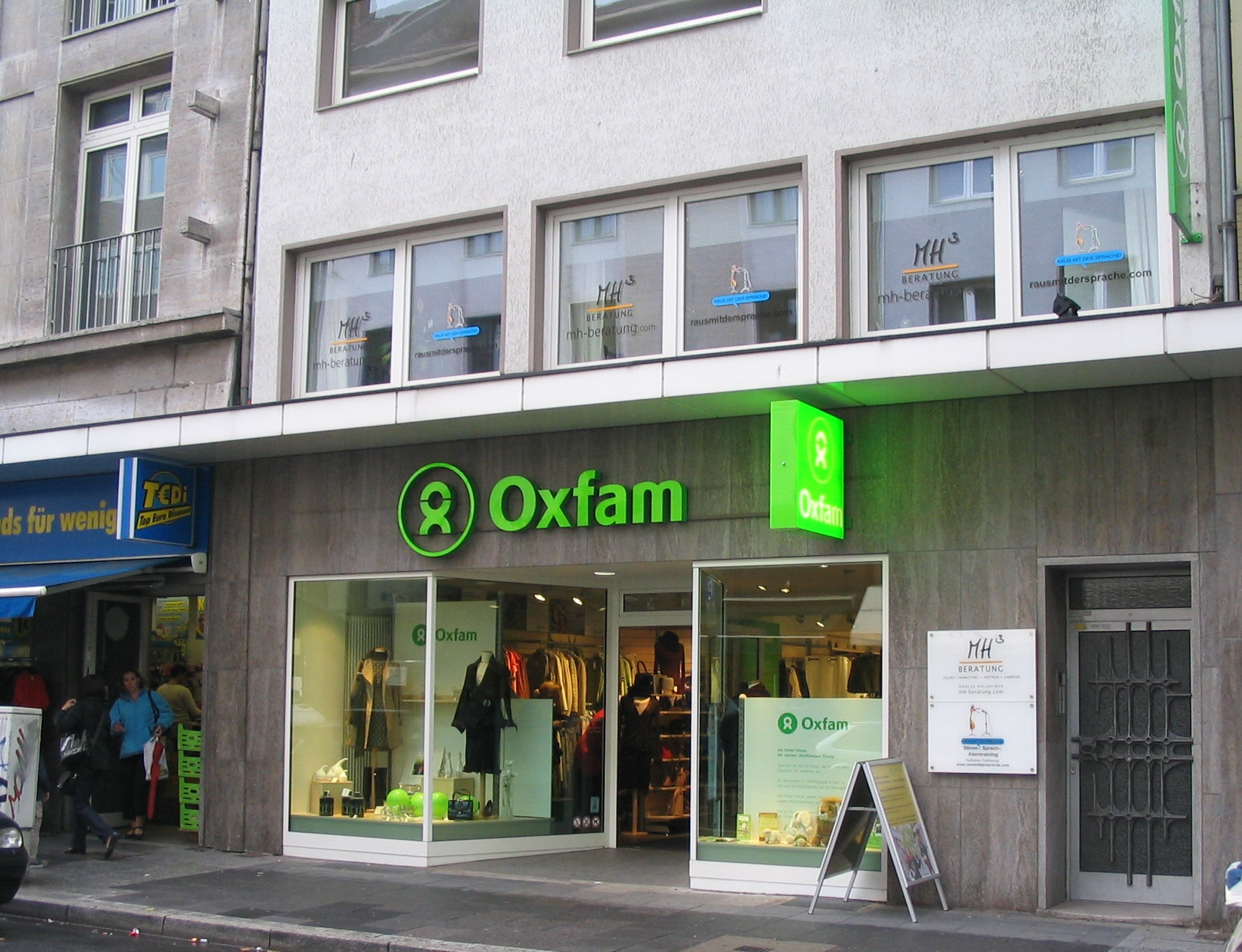 Oxfam, ein Tag nach der Neueröffnung, auf der Friedrichstraße 25 in Düsseldorf-Friedrichstadt 2001-2010 Pelzmodelle Kuhn vormals Blumen Risse